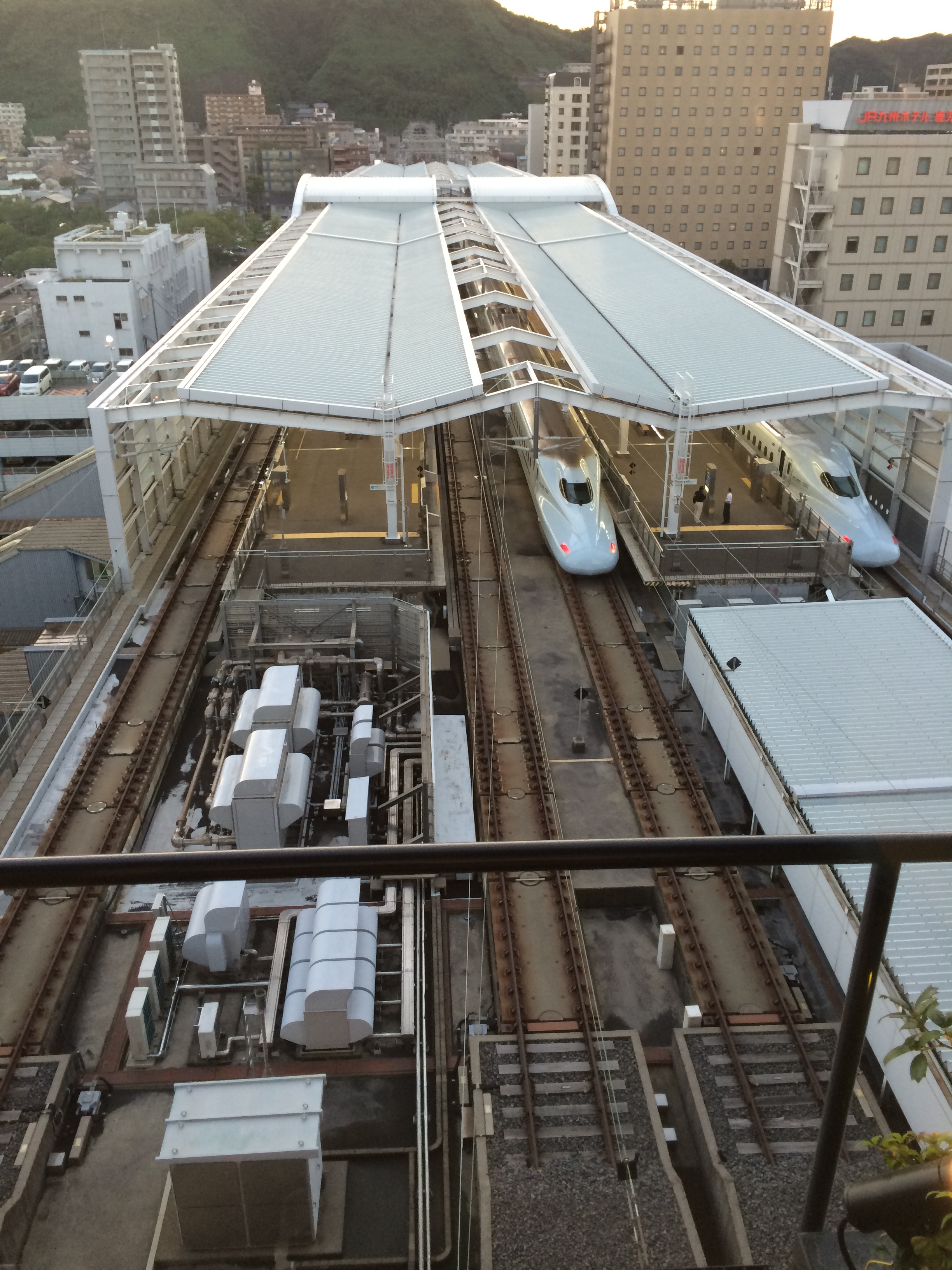 鹿児島中央駅新幹線乗り場